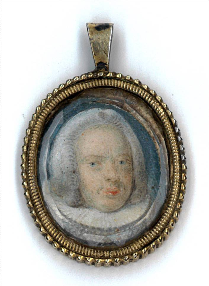 Portrætmedaljon forestillende Nicol Seidelin Bøgh (1717-1778). Privateje